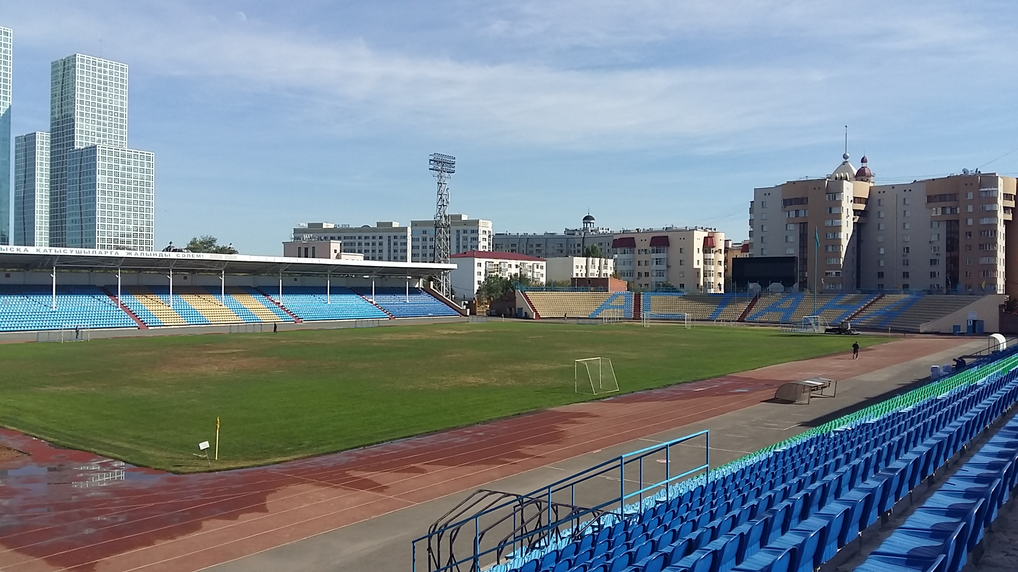 Стадион имени Х. Мунайтпасова (Астана)